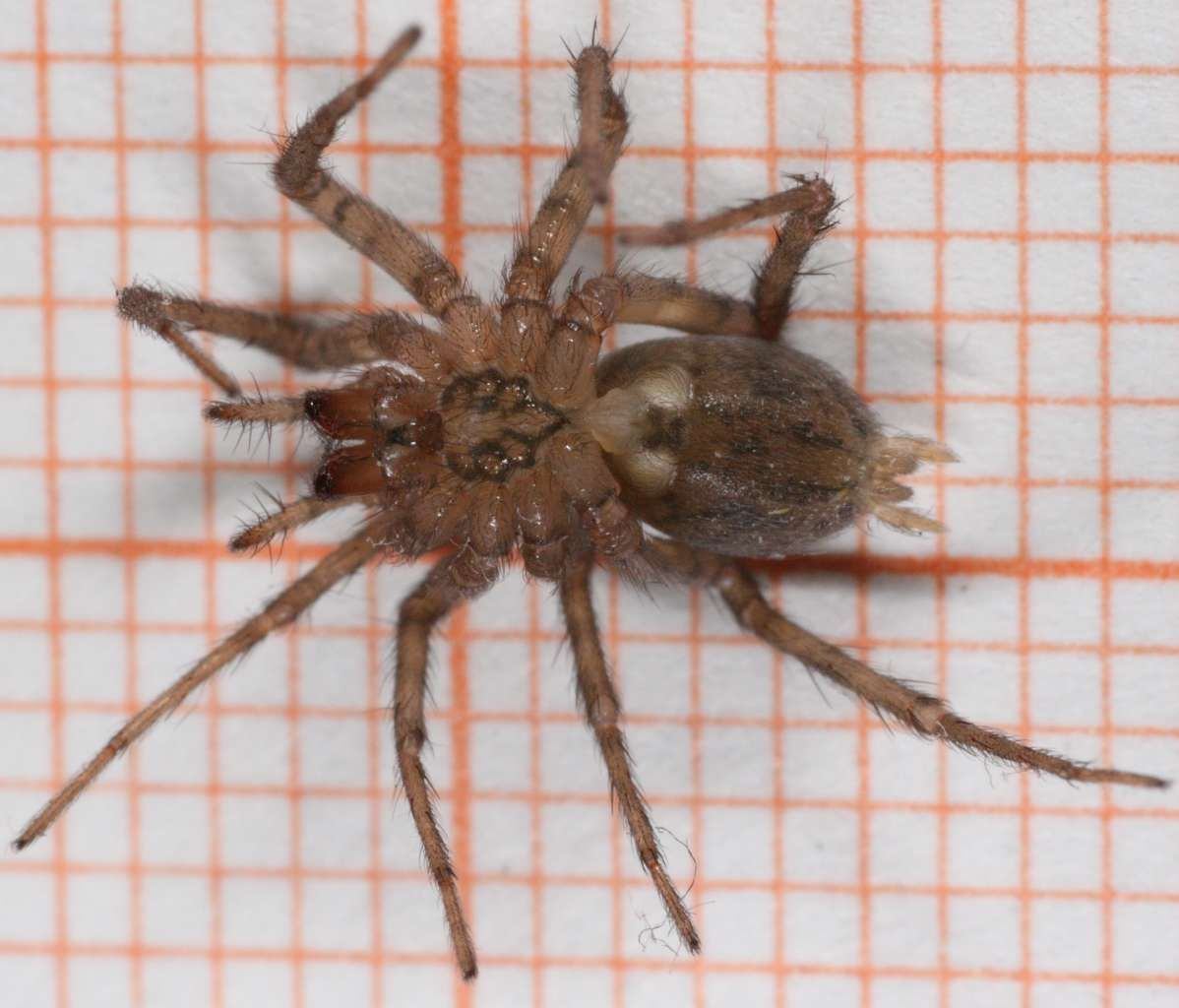 Hunn av husedderkopp Tegenaria domestica med riktig lange spinnvorter. Template:Byline